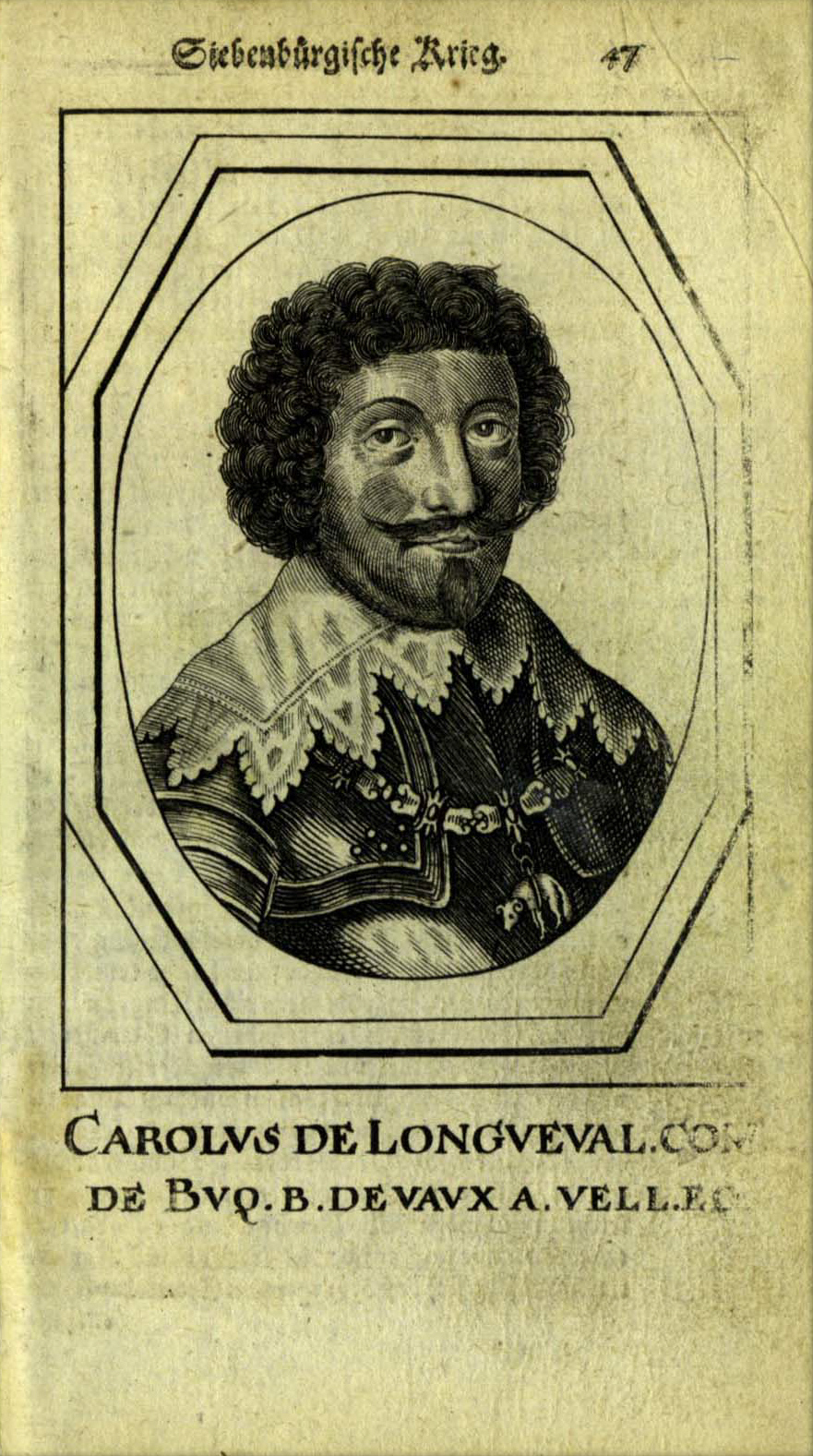 Ein Inhaltsverzeichnis befindet sich unter Geschichte des Dreißigjährigen Krieges.